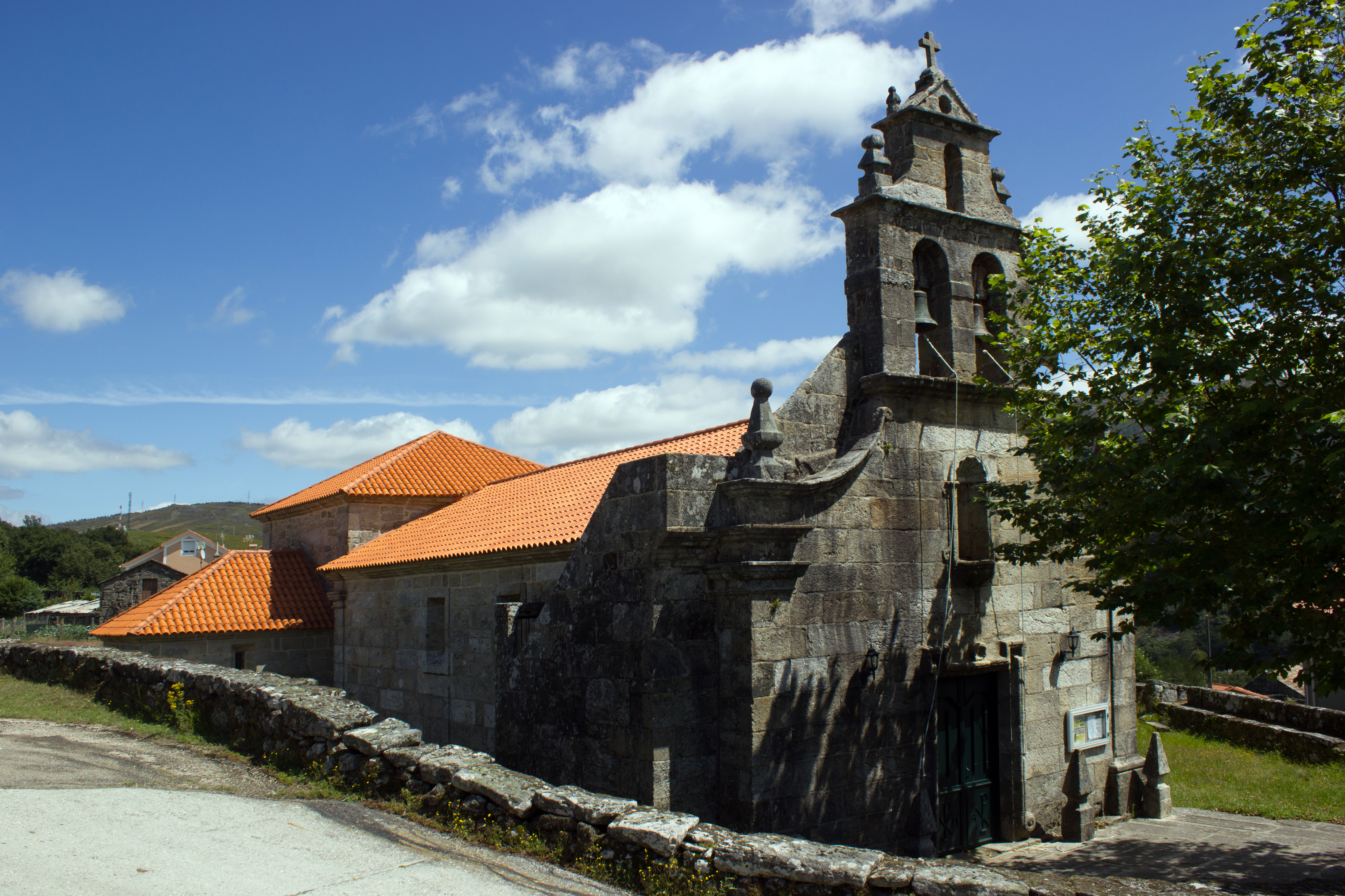 Igrexa de San Salvador de Prado, no concello de Covelo.